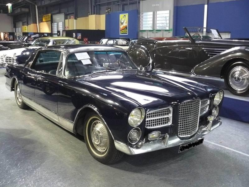 Retromobile 2012